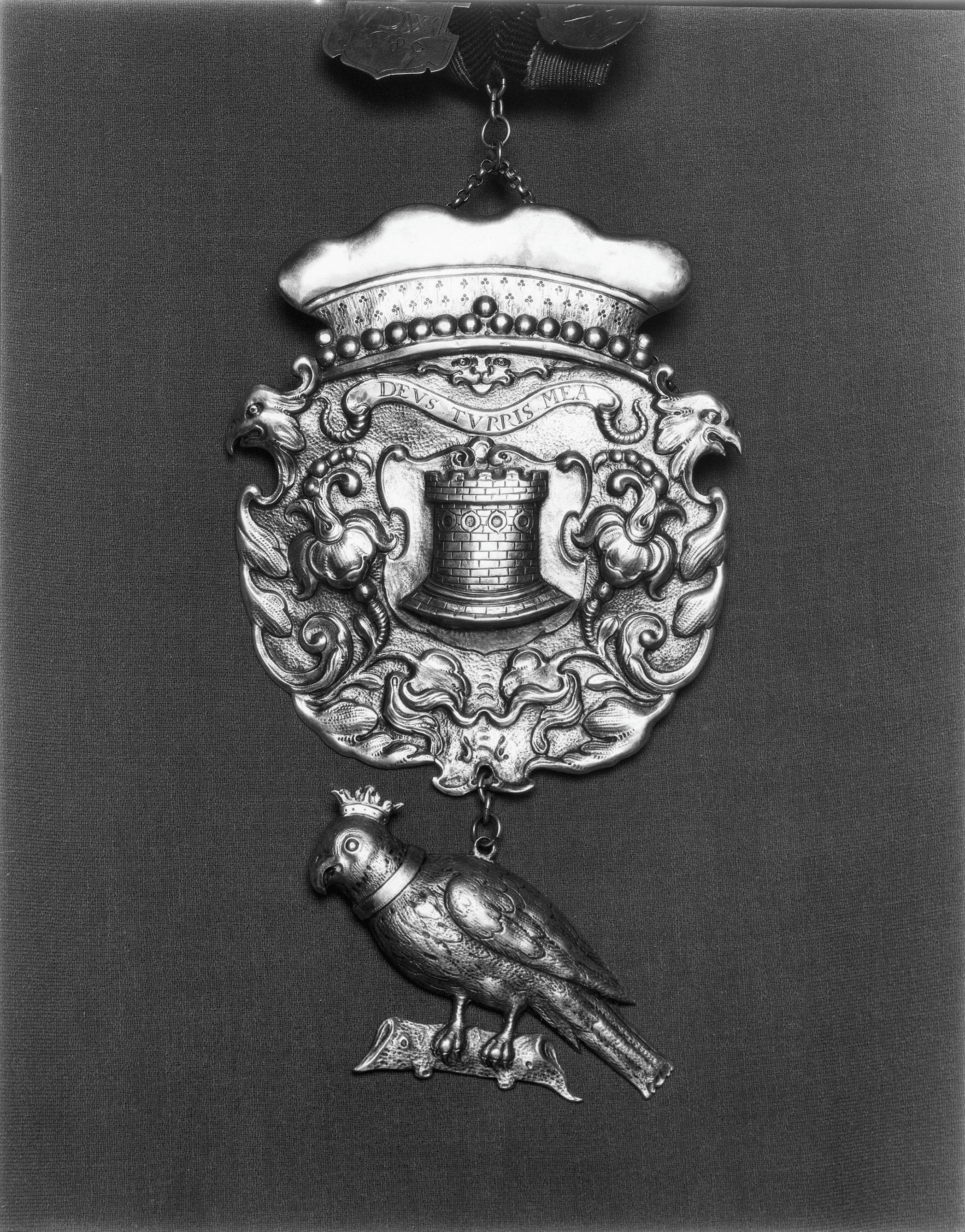 Gemeentehuis: Schutterszilver